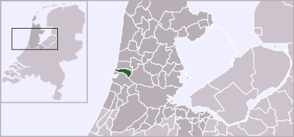 Location of Beverwijk